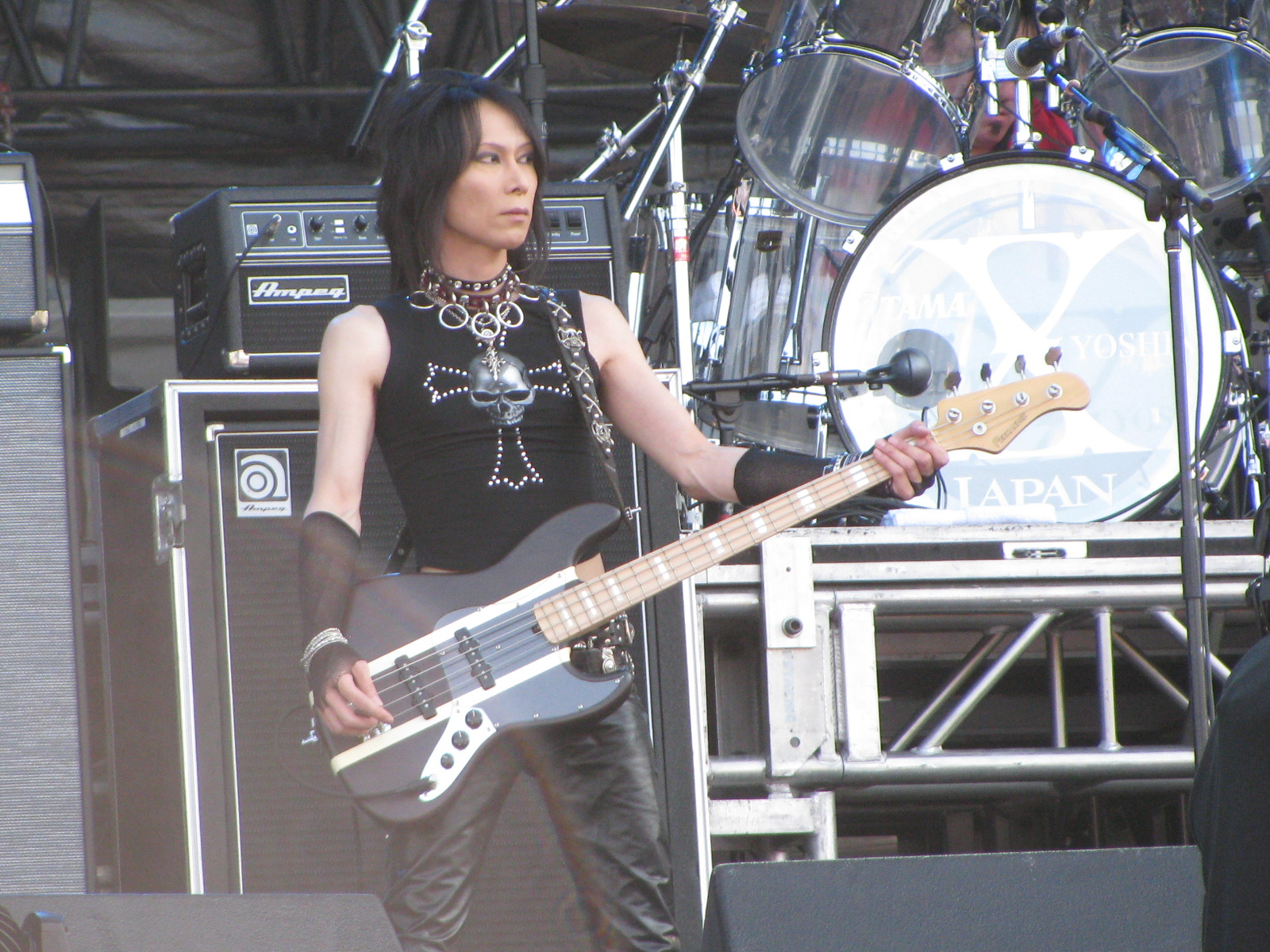 X Japan